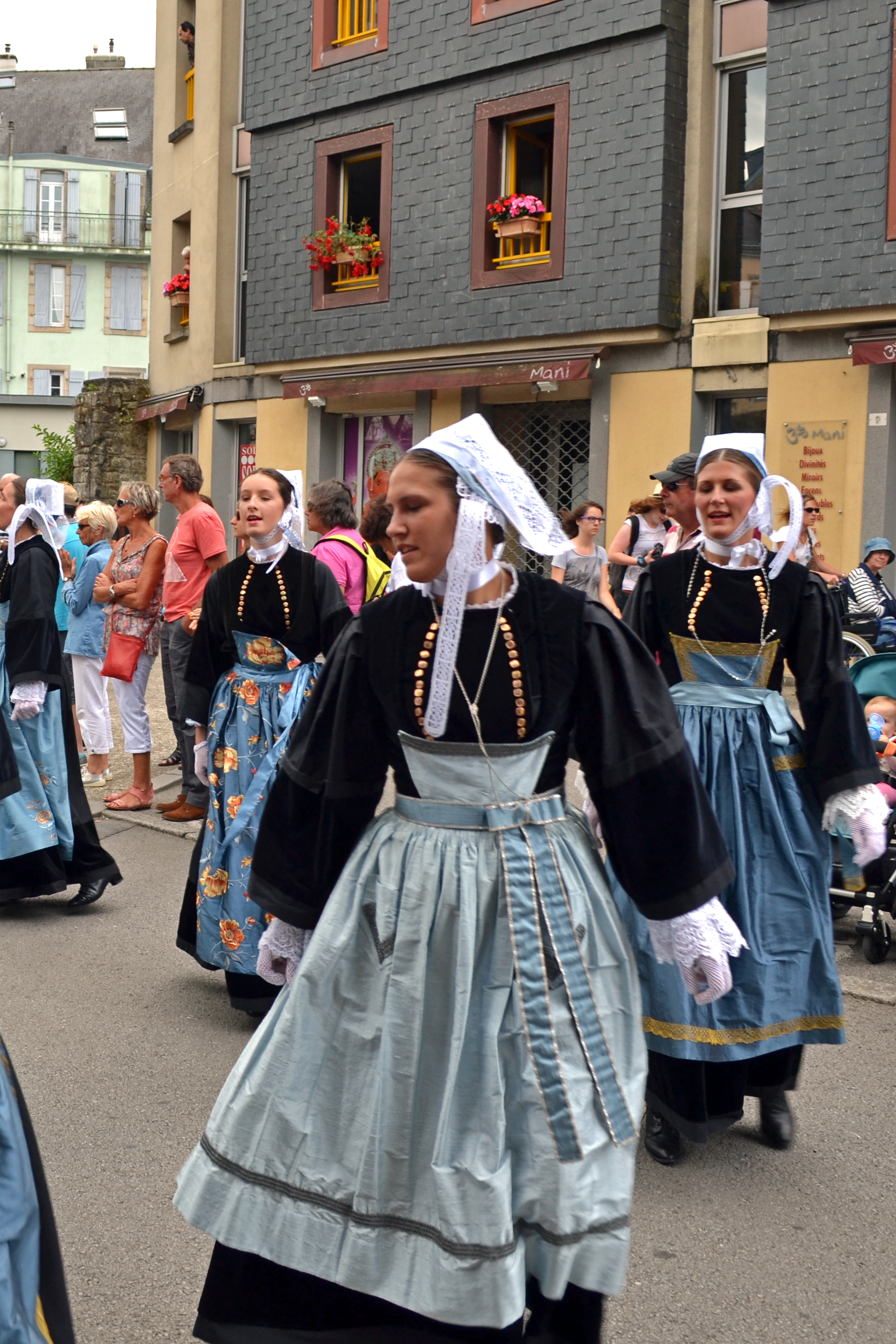 Défilé du cercle celtique Danserien Ar vro Pourlet du Croisty lors du festival de Cornouaille 2014 le dimanche 27 juillet pour Kemper en Fête dans les rues de Quimper.